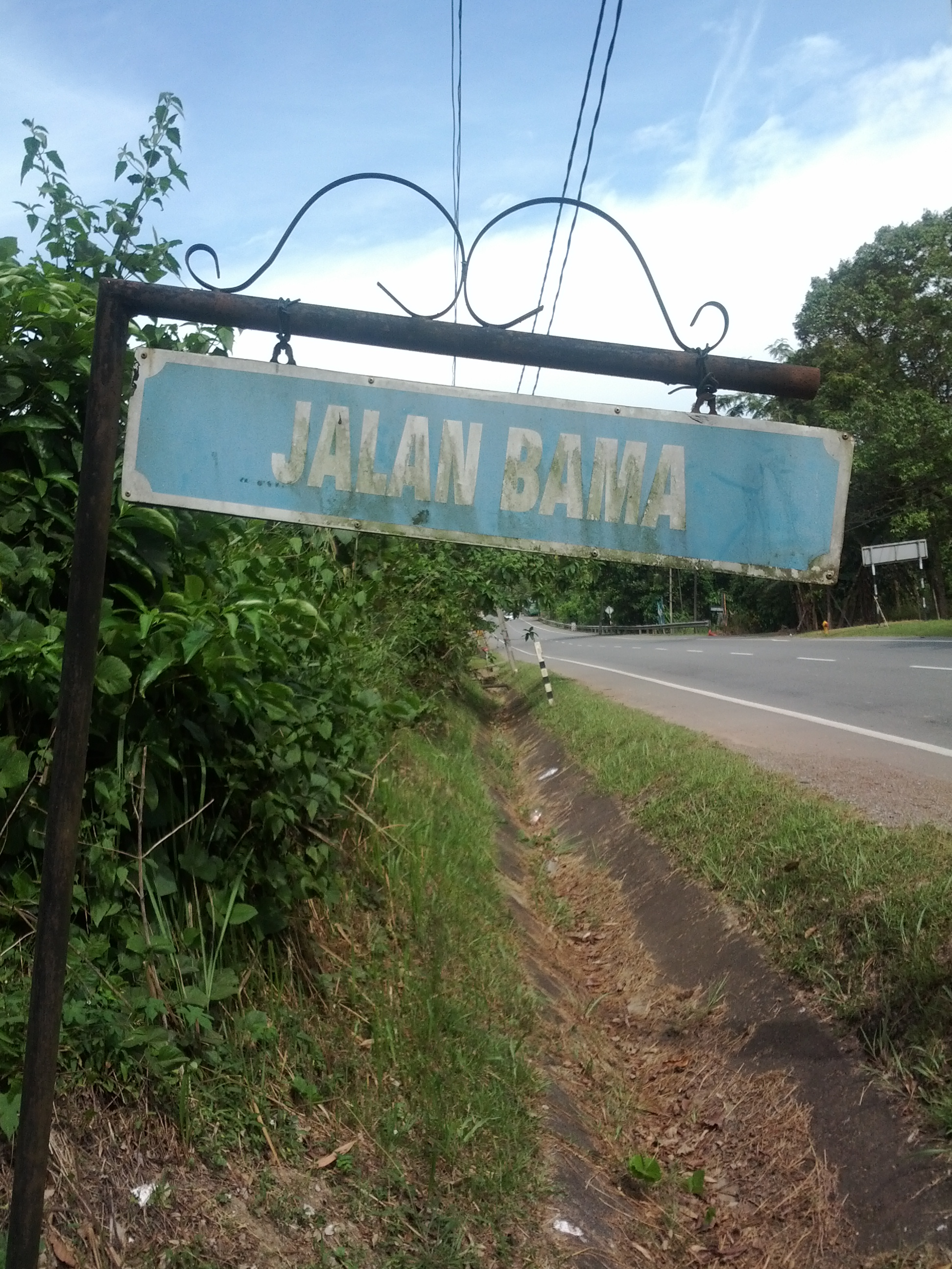 Gua Bama: Papan tanda Jalan Bama, Pahang.